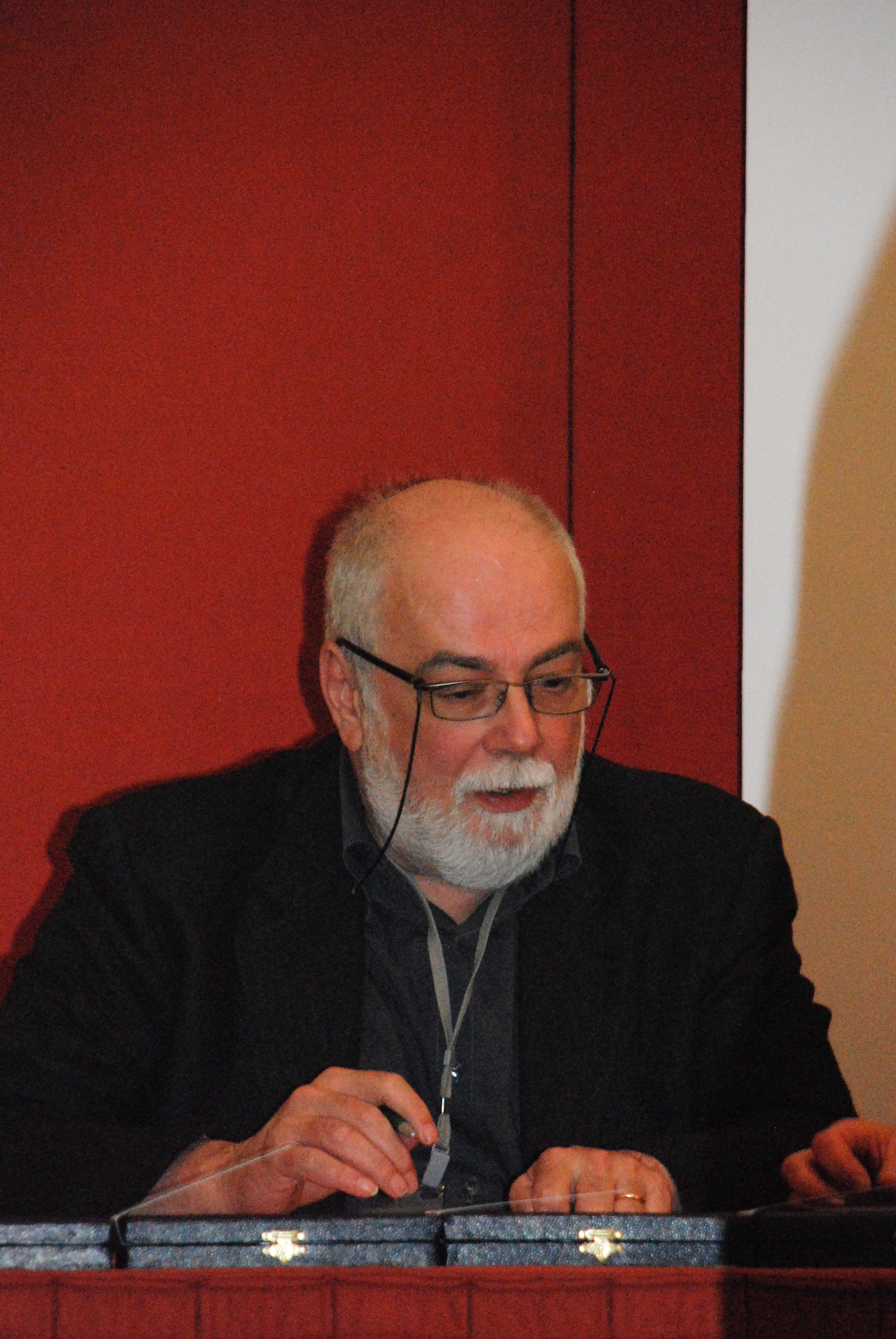 Alfredo Castelli, Deepcon 11, 2010.